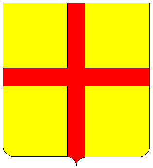 arm of the Lordat de Castagnac armes des Lordat figurant sur le chateau de Castagnac